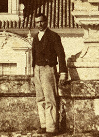 Probable imagen de Luis Masson